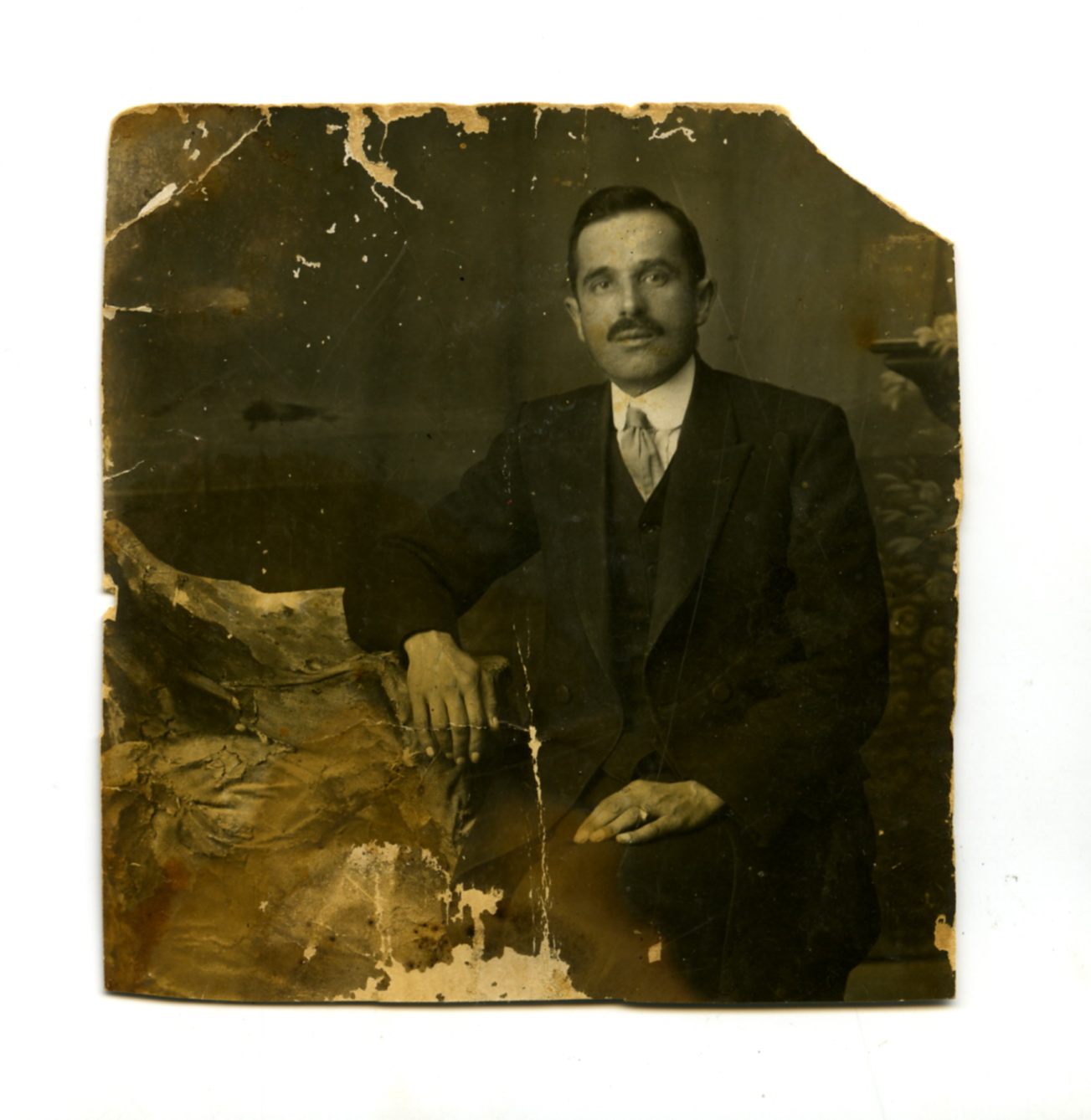 משה מואיסיז מצא-מוהל קהילת זקינטוס והפלפונז. כיהן גם כנשיא הקהילה בשנות העשרים של המאה העשרים